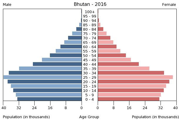 A population pyramid illustrates the age and sex structure of a country's population and may provide insights about political and social stability, as well as economic development. The population is distributed along the horizontal axis, with males shown on the left and females on the right. The male and female populations are broken down into 5-year age groups represented as horizontal bars along the vertical axis, with the youngest age groups at the bottom and the oldest at the top. The shape of the population pyramid gradually evolves over time based on fertility, mortality, and international migration trends.